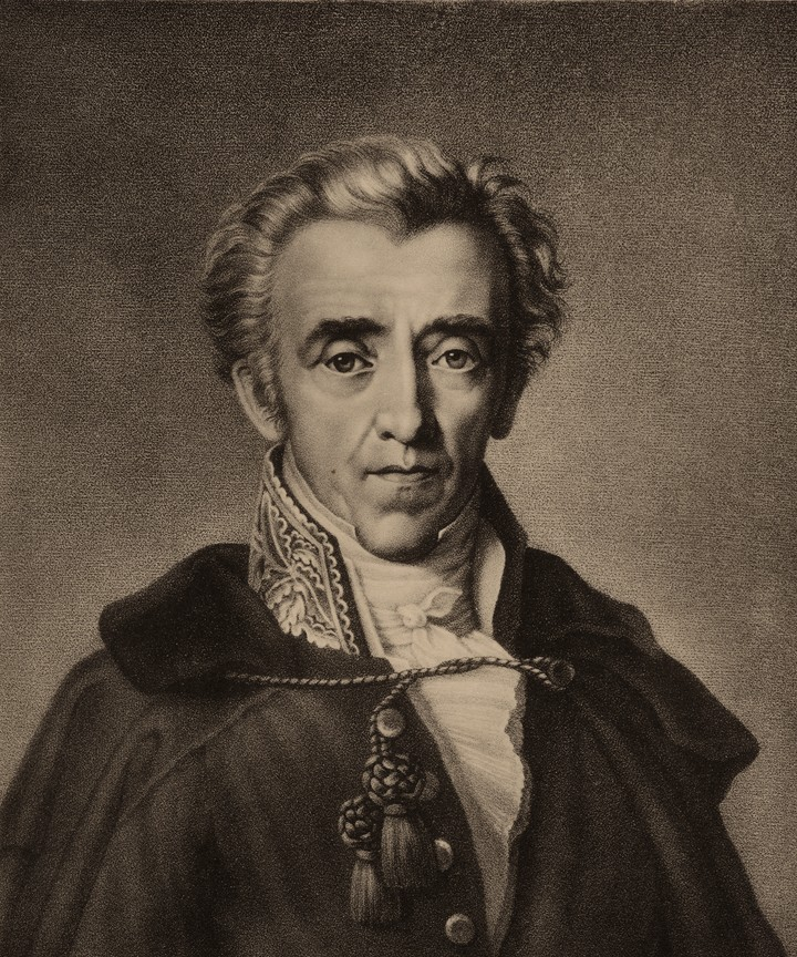 nach einem Gemälde von Karl Jakob Theodor Leybold